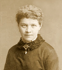 Natalia Janotha (Janothówna) - (ur. 8 czerwca 1856 w Warszawie, zm. 9 czerwca 1932 w Hadze) - polska kompozytorka i pianistka.